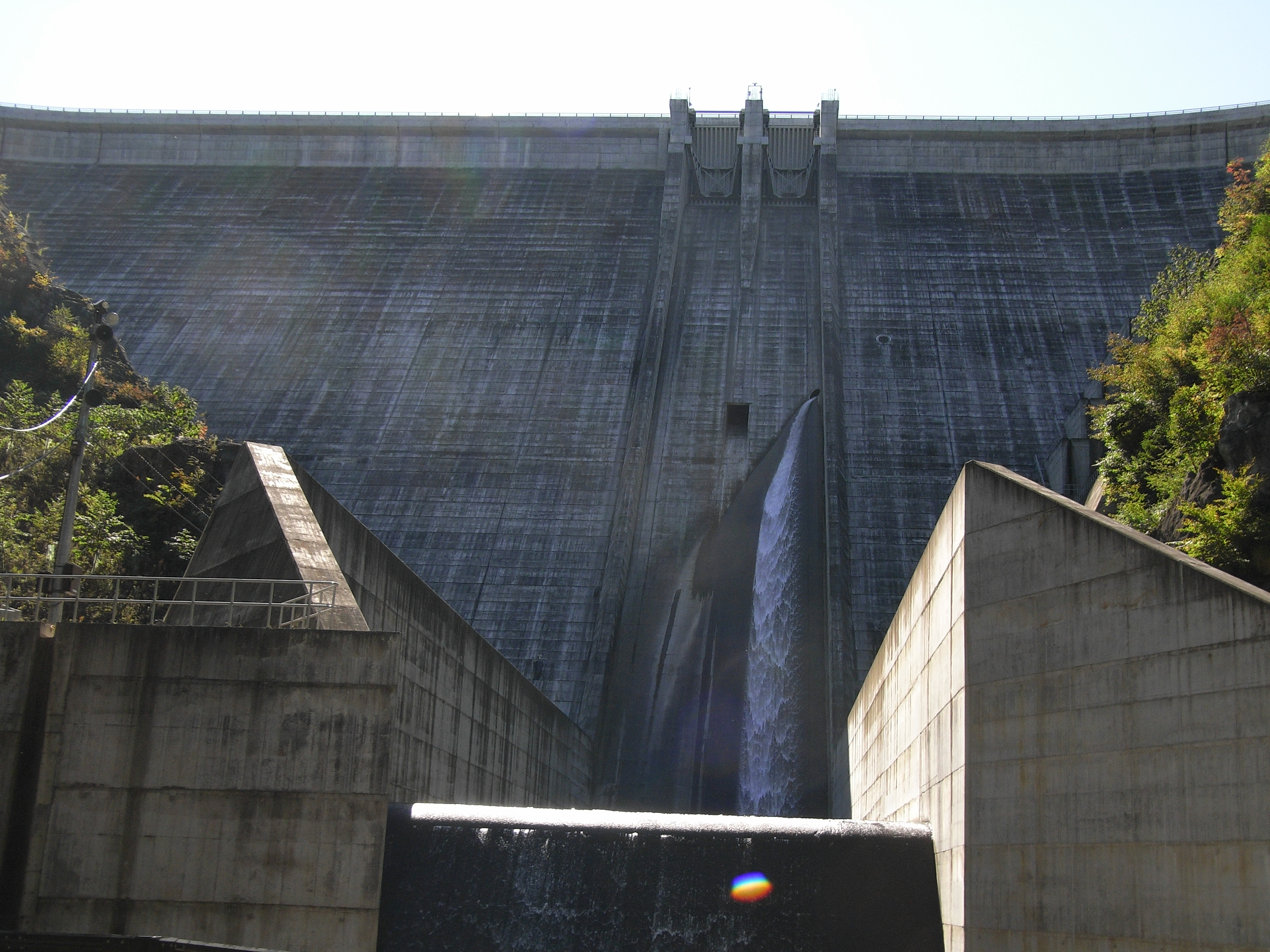 Dam